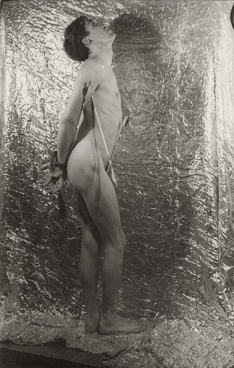 Saint Sebastian